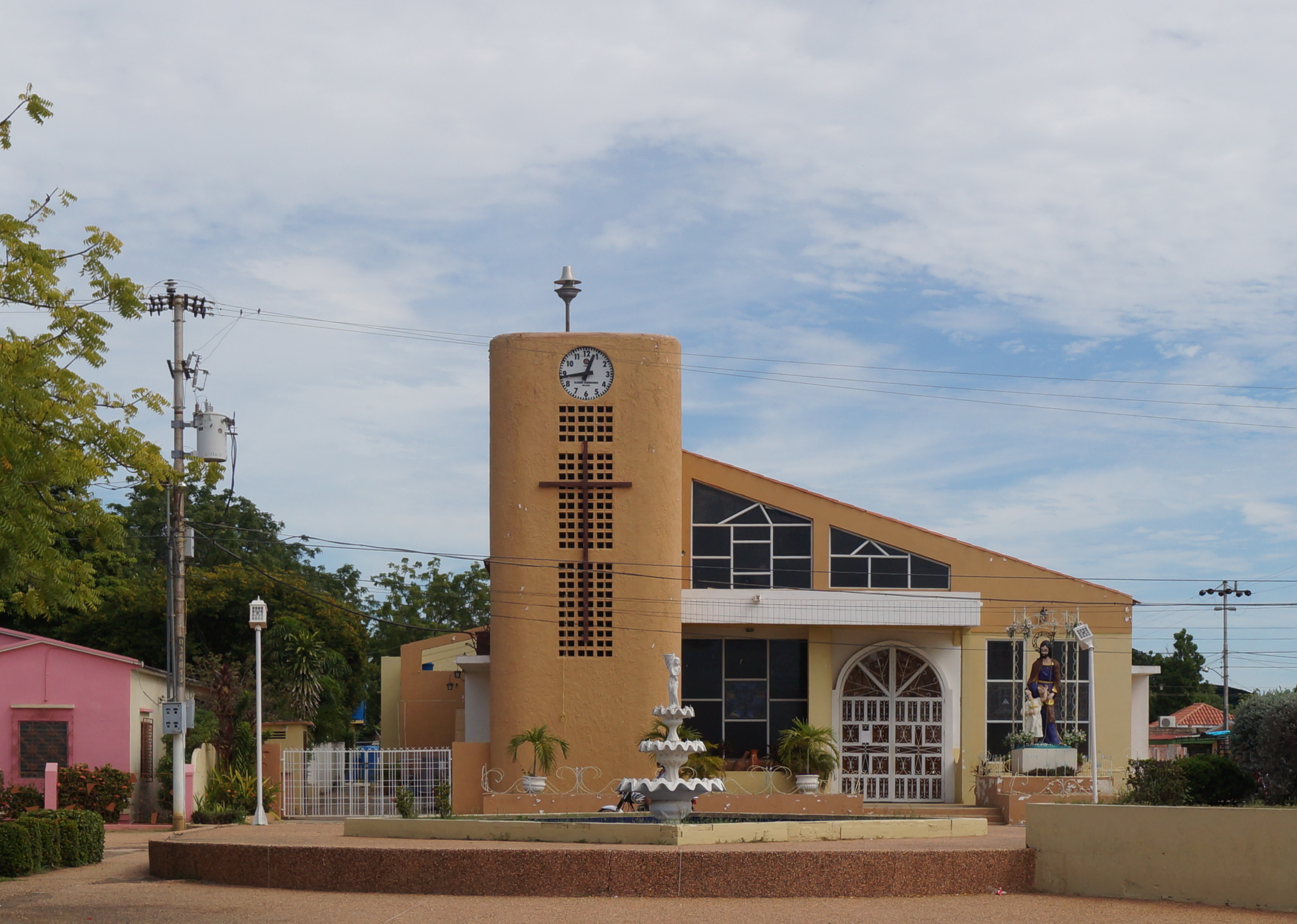 Iglesia San José. Ubicada en el municipio Santa Rita, Av Pedro Lucas Urribarrí. Puerto Escondido. Estado Zulia